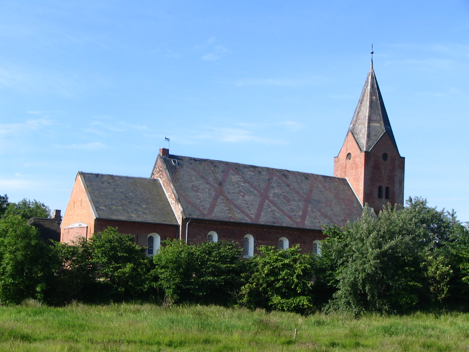 Marienkirche Horsbüll, Schleswig-Holstein, Germany